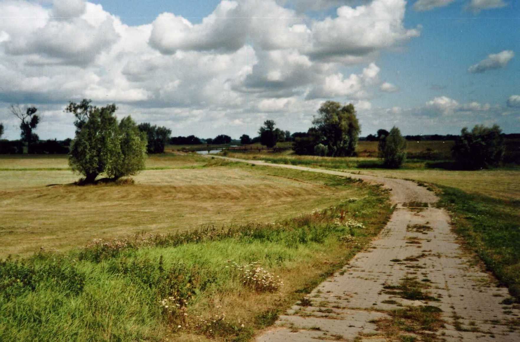 Die Garbe in der nördlichen Altmark in Sachsen-Anhalt, Teil der Wische; Blick von Süden zur Aland-Brücke bei Pollitz/Altmark; Bereich im Naturschutzgebiet Aland-Elbe-Niederung